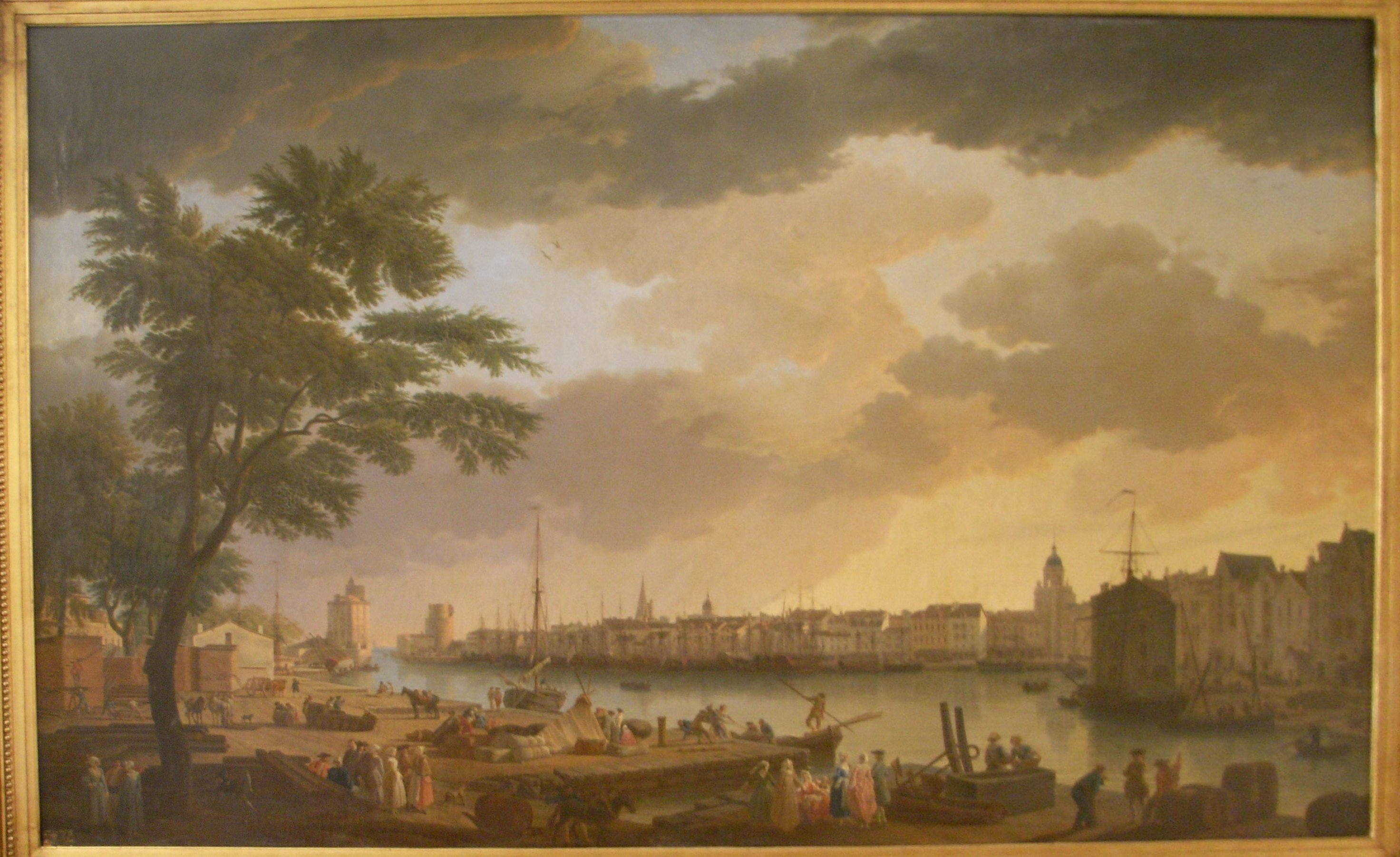 Vue du port de La Rochelle, par J. Vernet au Musée du Nouveau Monde à La Rochelle (Charente-Maritime - France).